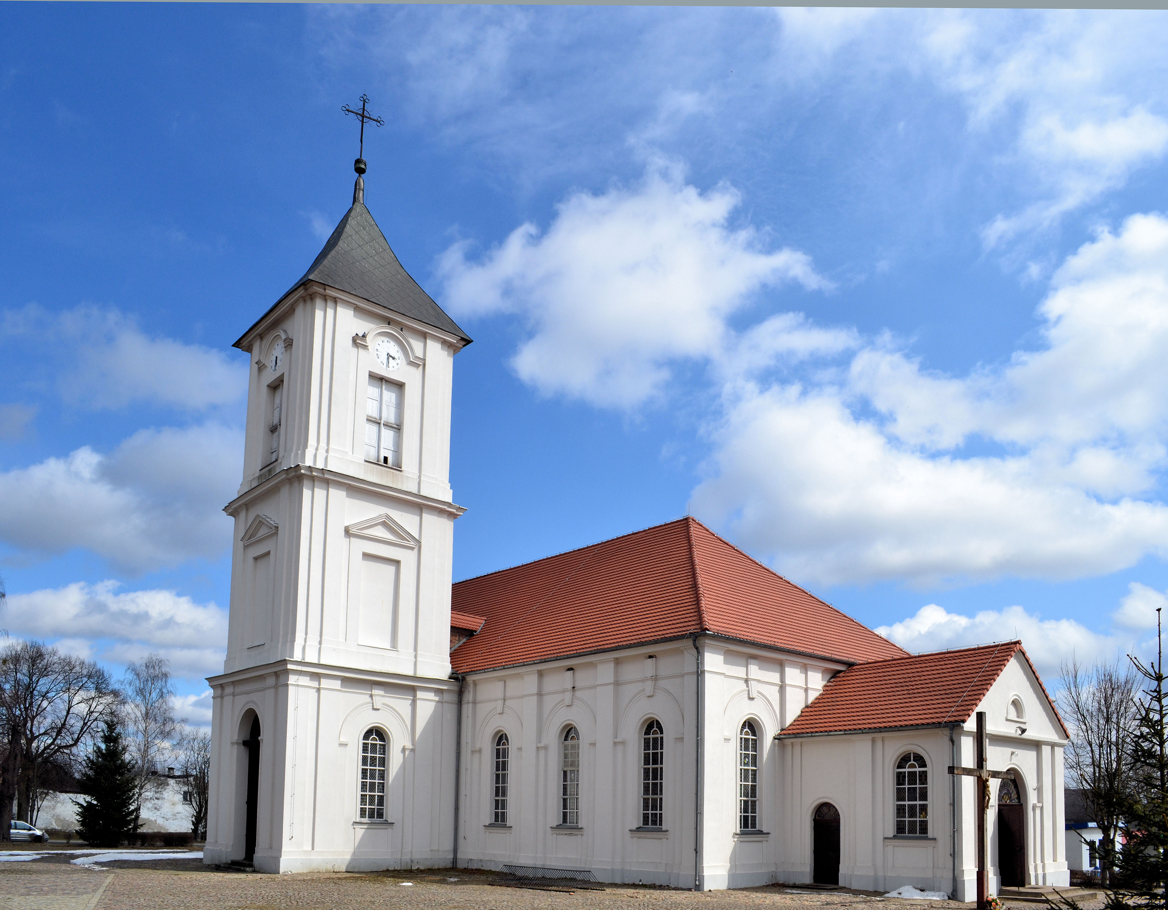 Kalisz Pomorski